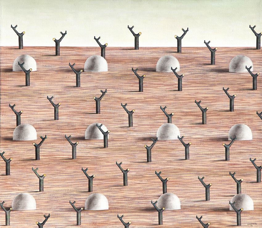 Hermann Waldenburg, Der ehemalige Kirschgarten, 1972, Öl auf Leinen, 80 x 92 cm